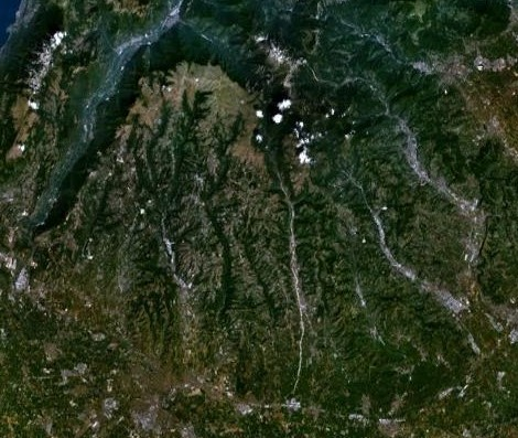 Vista satellitare della Lessinia (Verona)